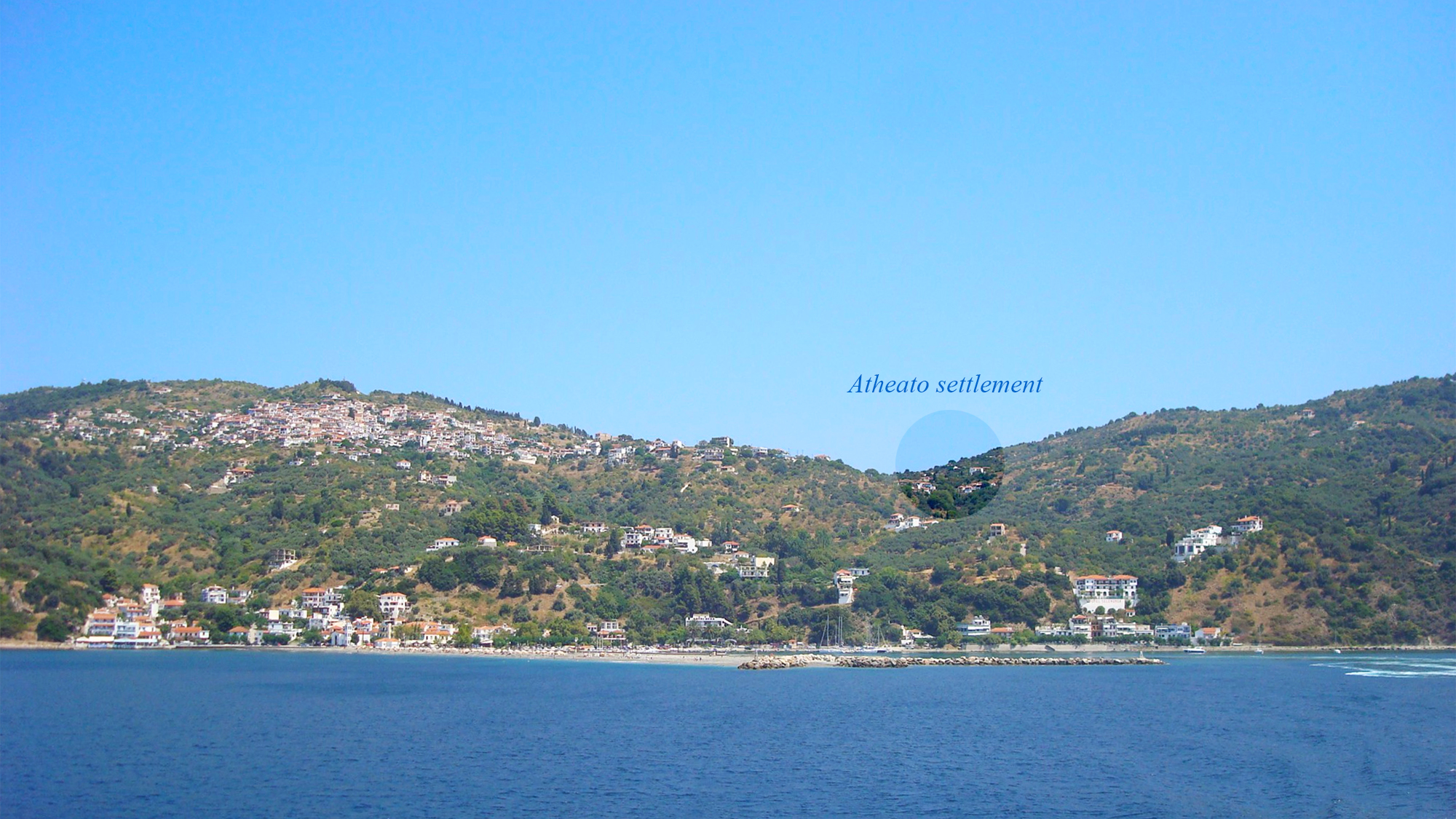 Ο οικισμός Αθέατο στη νήσο Σκόπελο, όπως φαίνεται από τη θάλασσα έξω από το λιμάνι του Λουτρακίου.